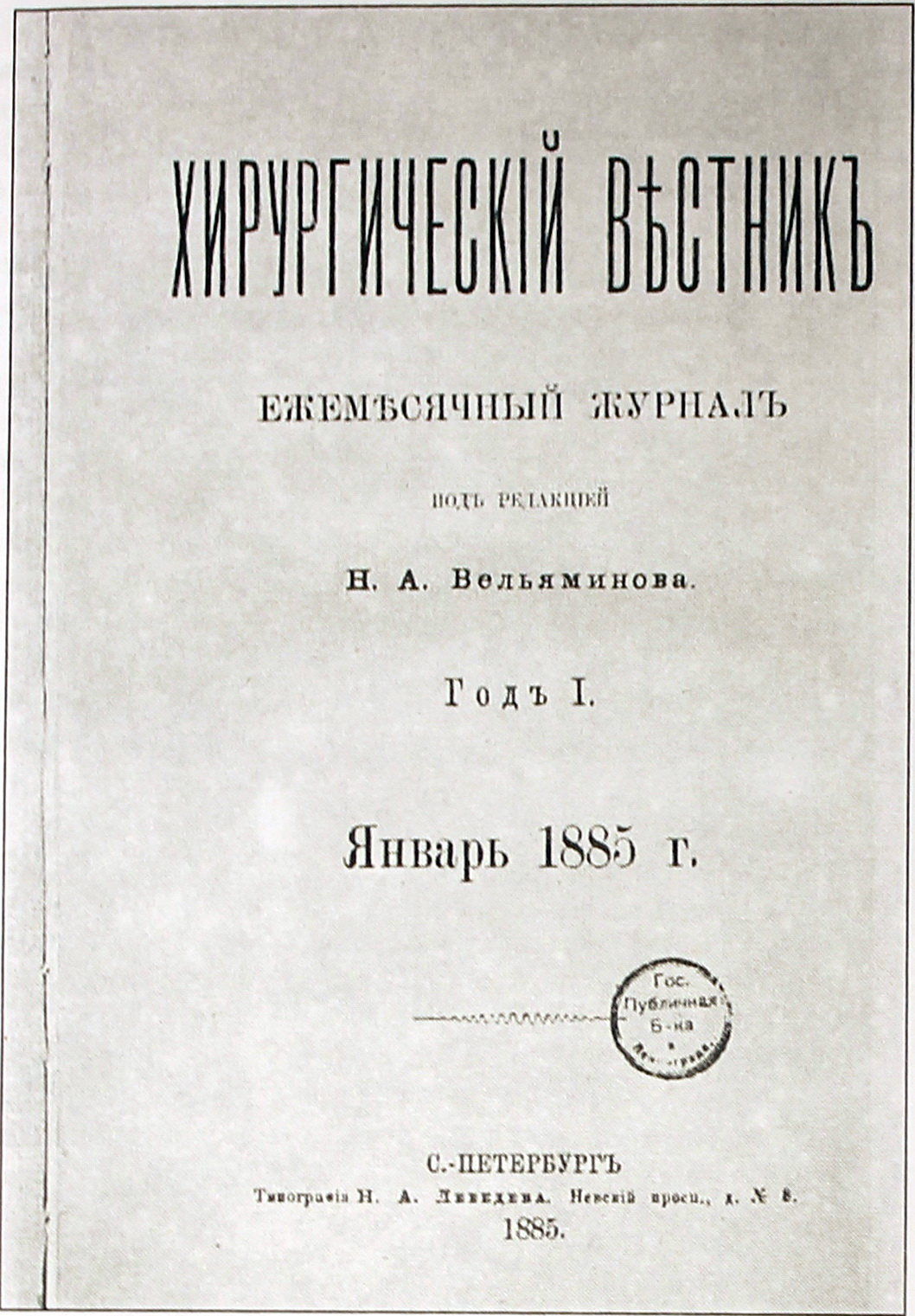 Обложка первого выпуска научного медицинского журнала «Вестник хирургии имени И. И. Грекова», 1885